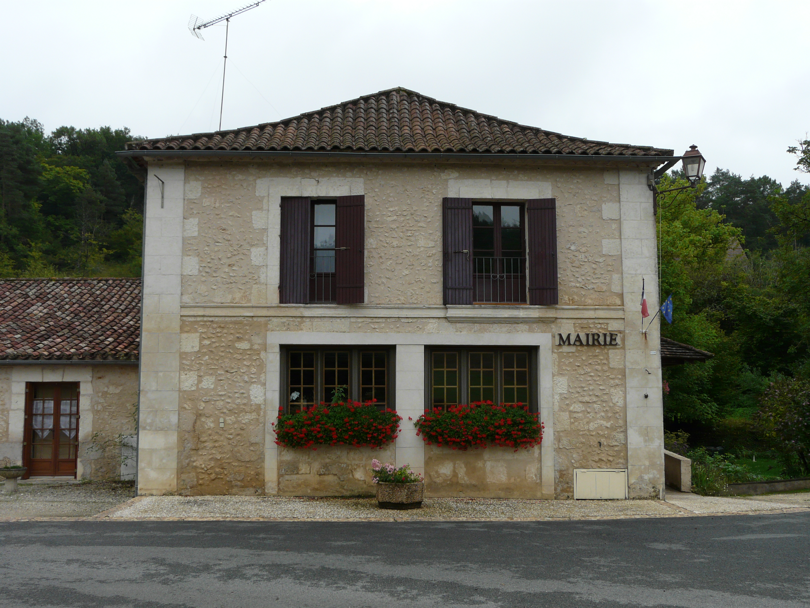 La mairie de Saint-Hilaire-d'Estissac, Dordogne, France.